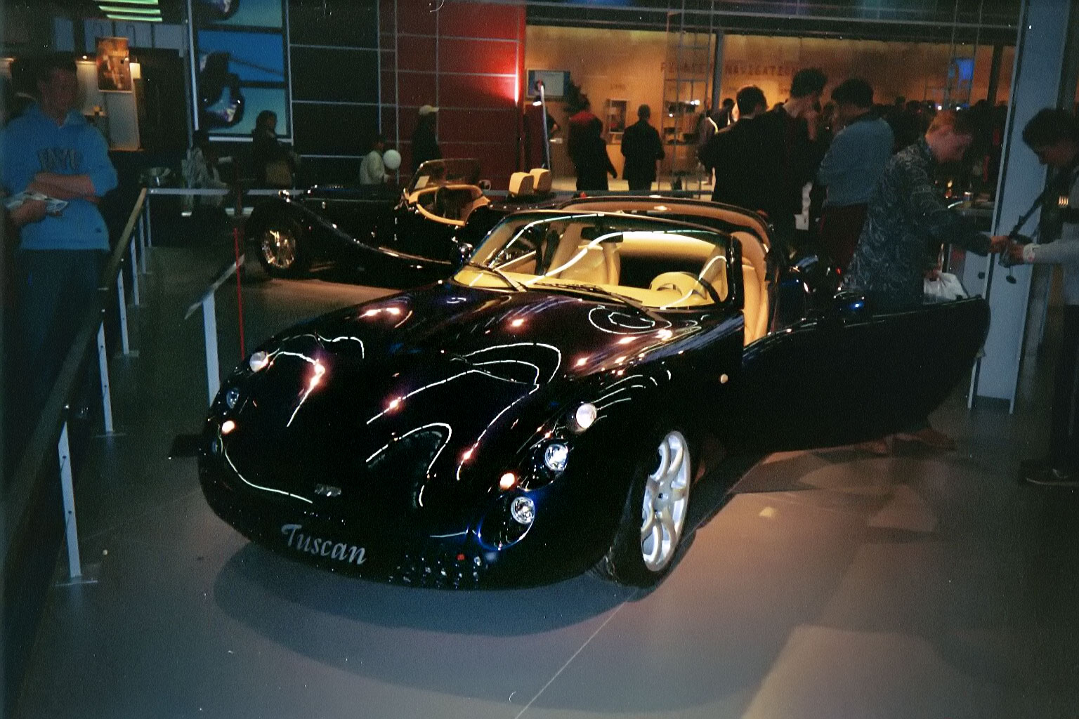 TVR Tuscan op de RAI